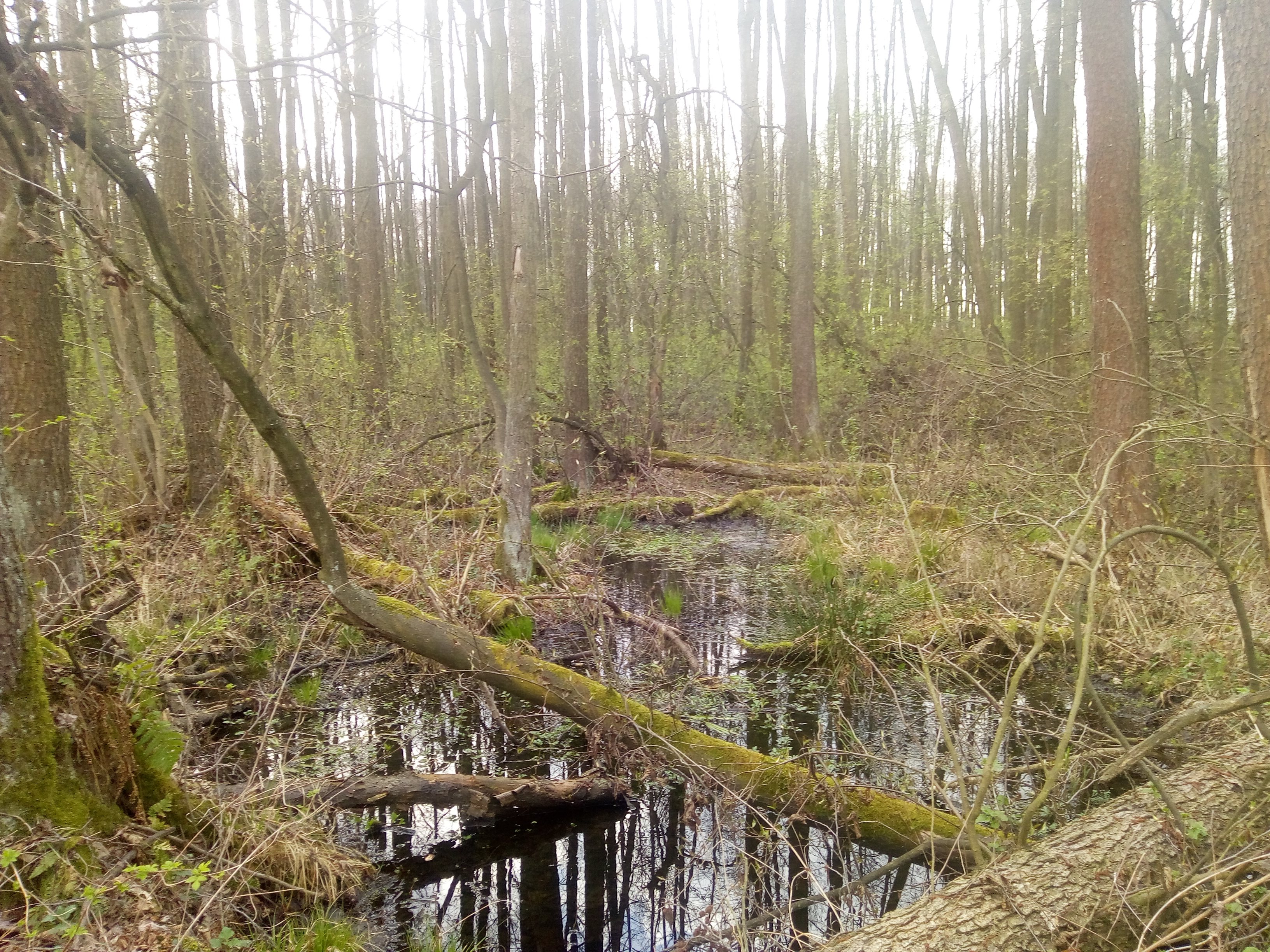 Teren rezerwatu od strony drogi asfaltowej